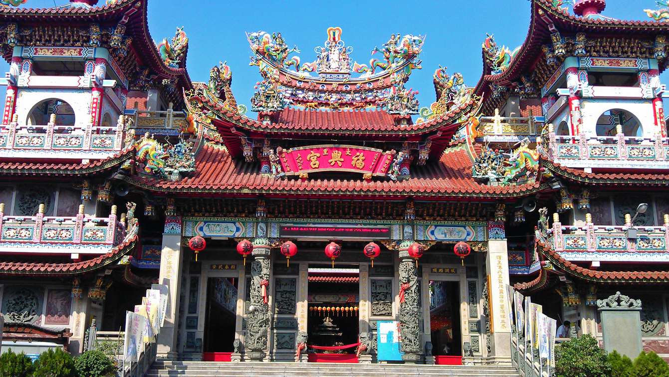 中文（台灣）: 大里福興宮